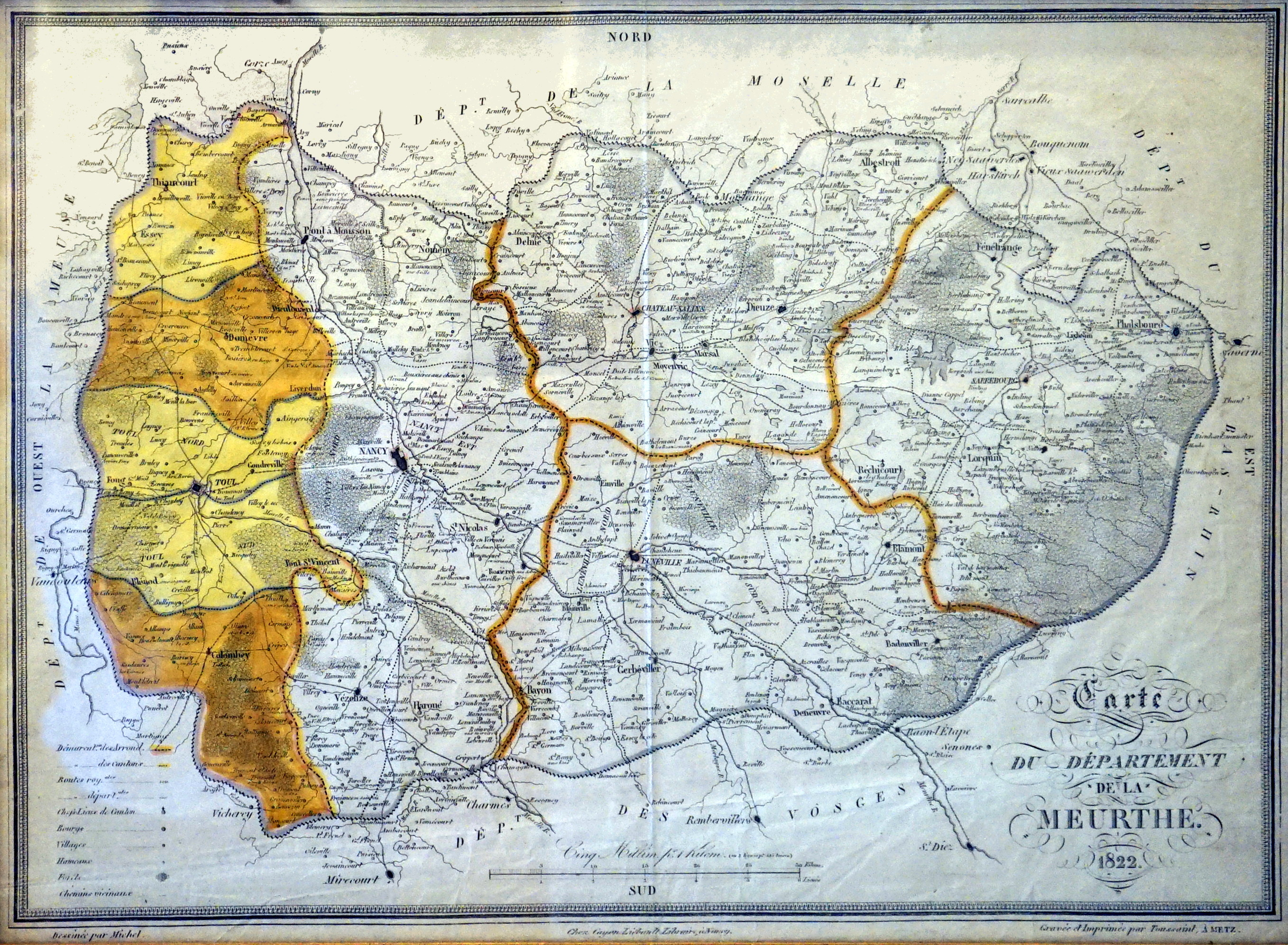 Carte au musée de Toul.